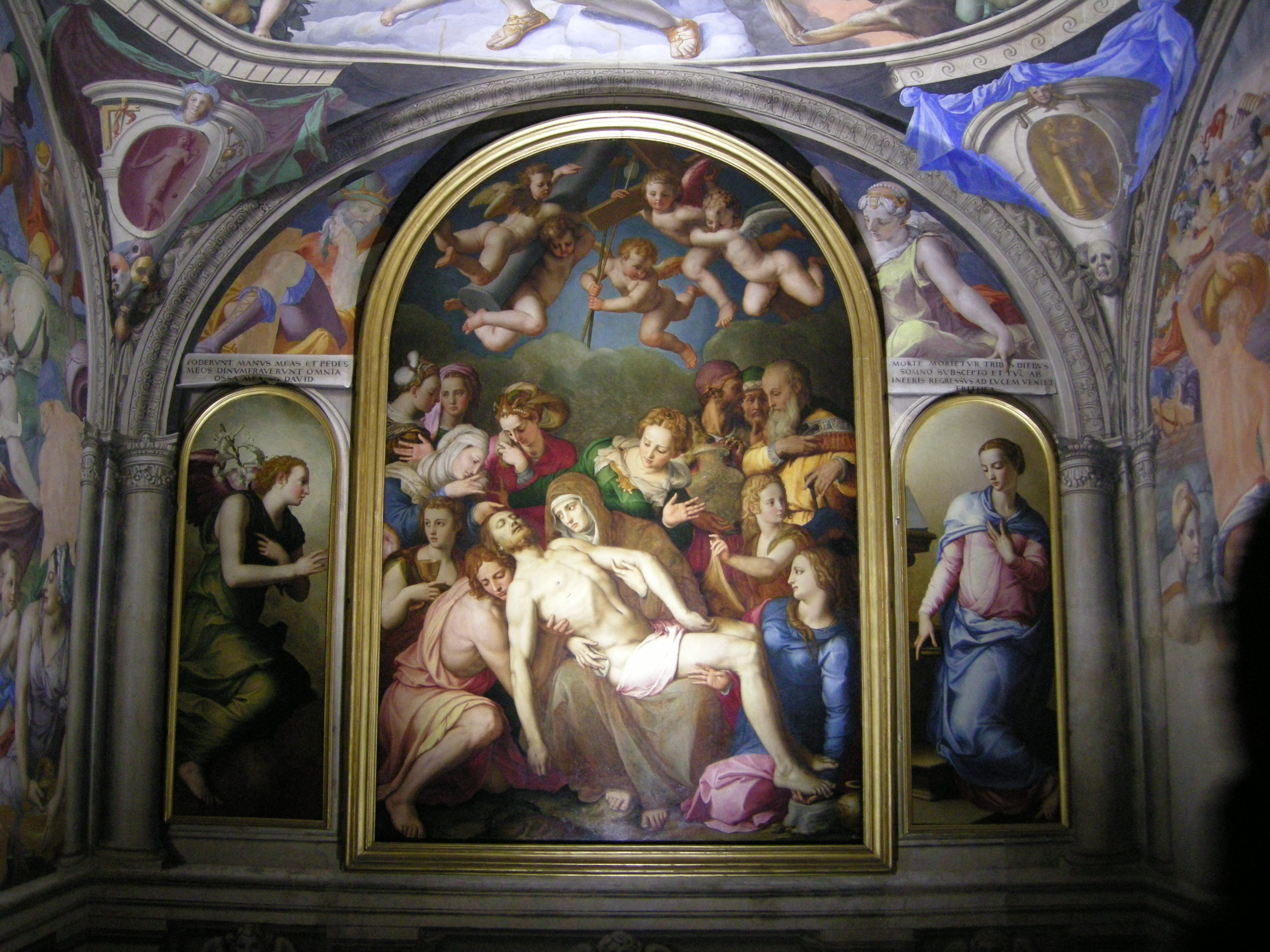 Cappella di eleonora di toledo